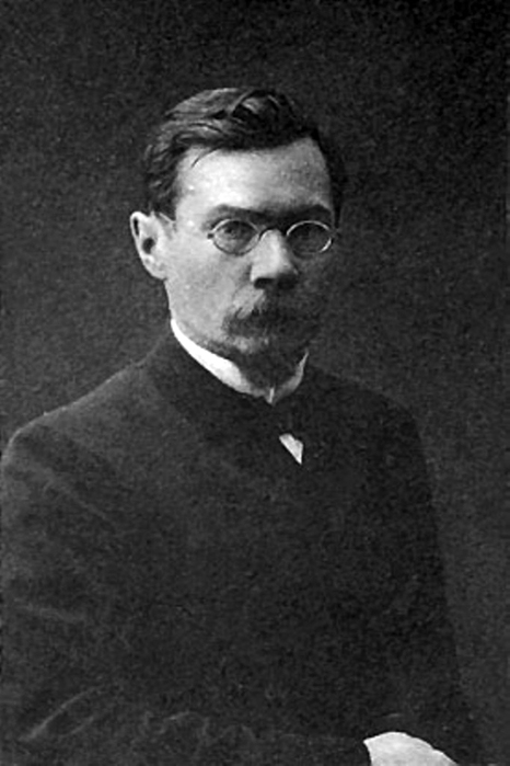 Николай Лукич Скалозубов (иногда Сколозубов[1]; 29 октября 1861, Кострома — 19 февраля 1915, Курган) — губернский агроном, общественный деятель, депутат II и III Государственной думы от Тобольской губернии (1907—1912).